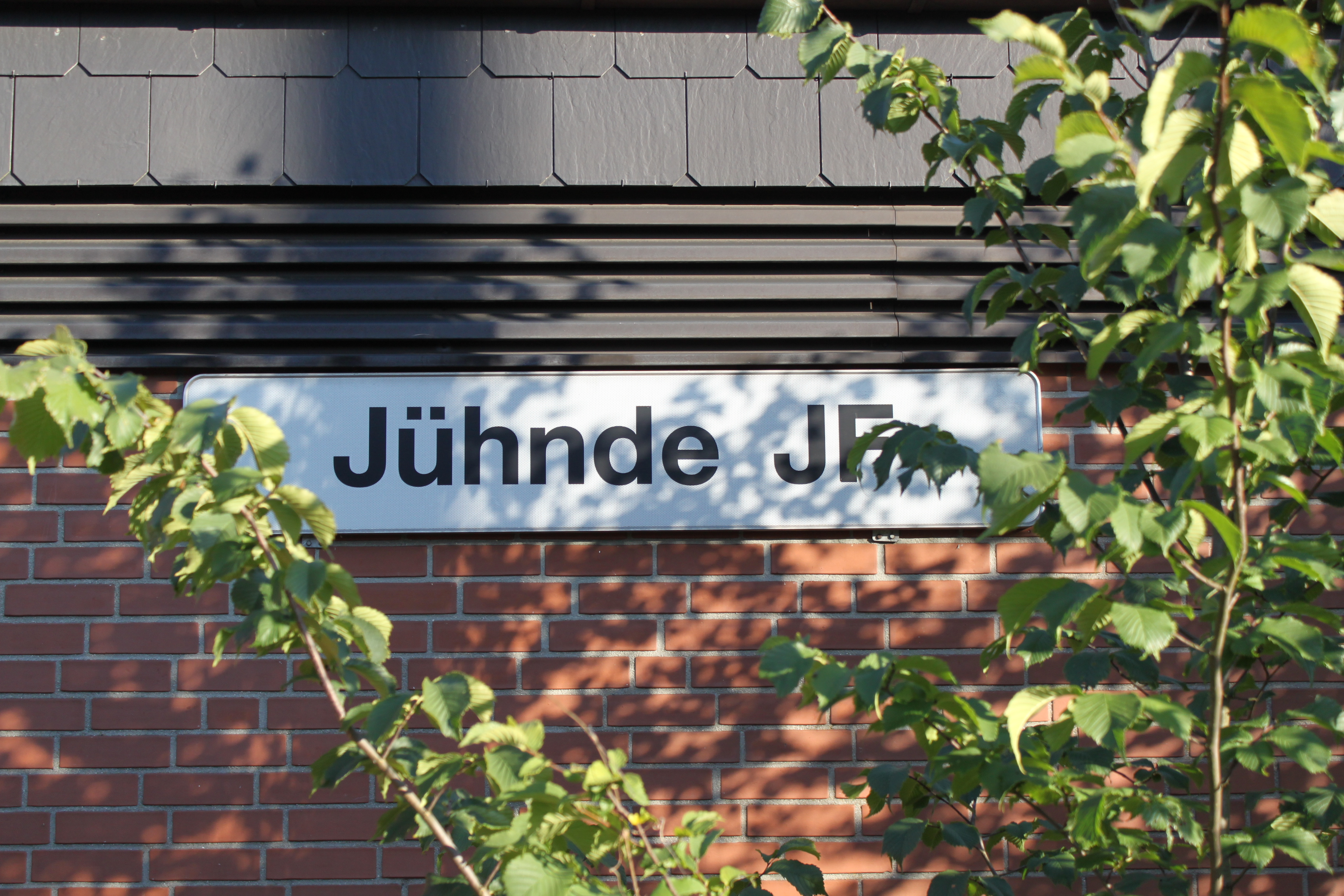 Überholbahnhof Jühnde